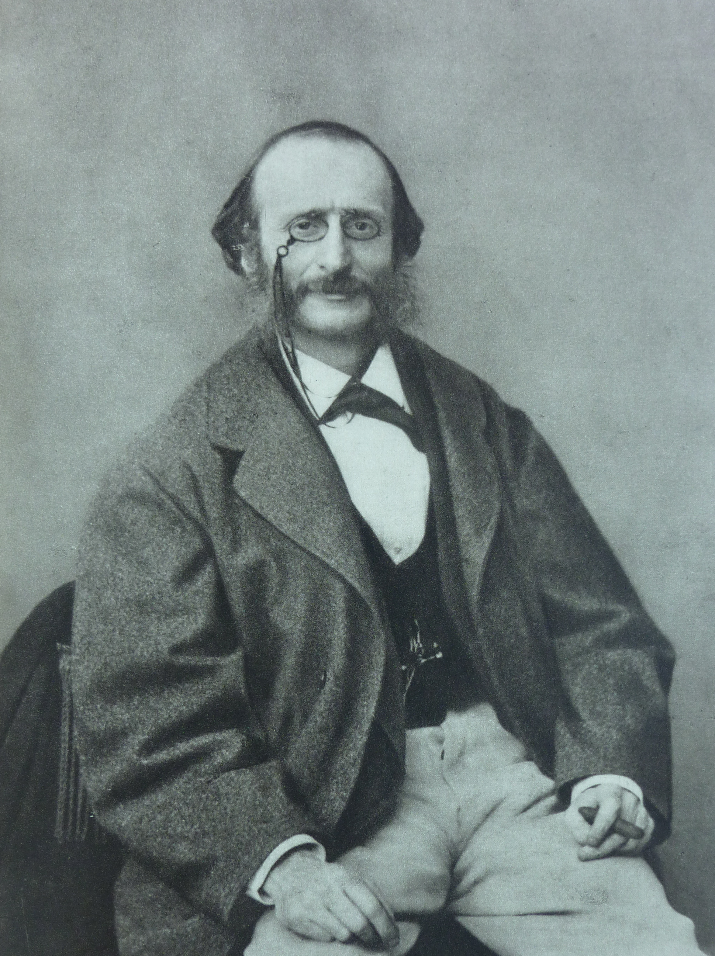 Jacques Offenbach, Foto von Nadar